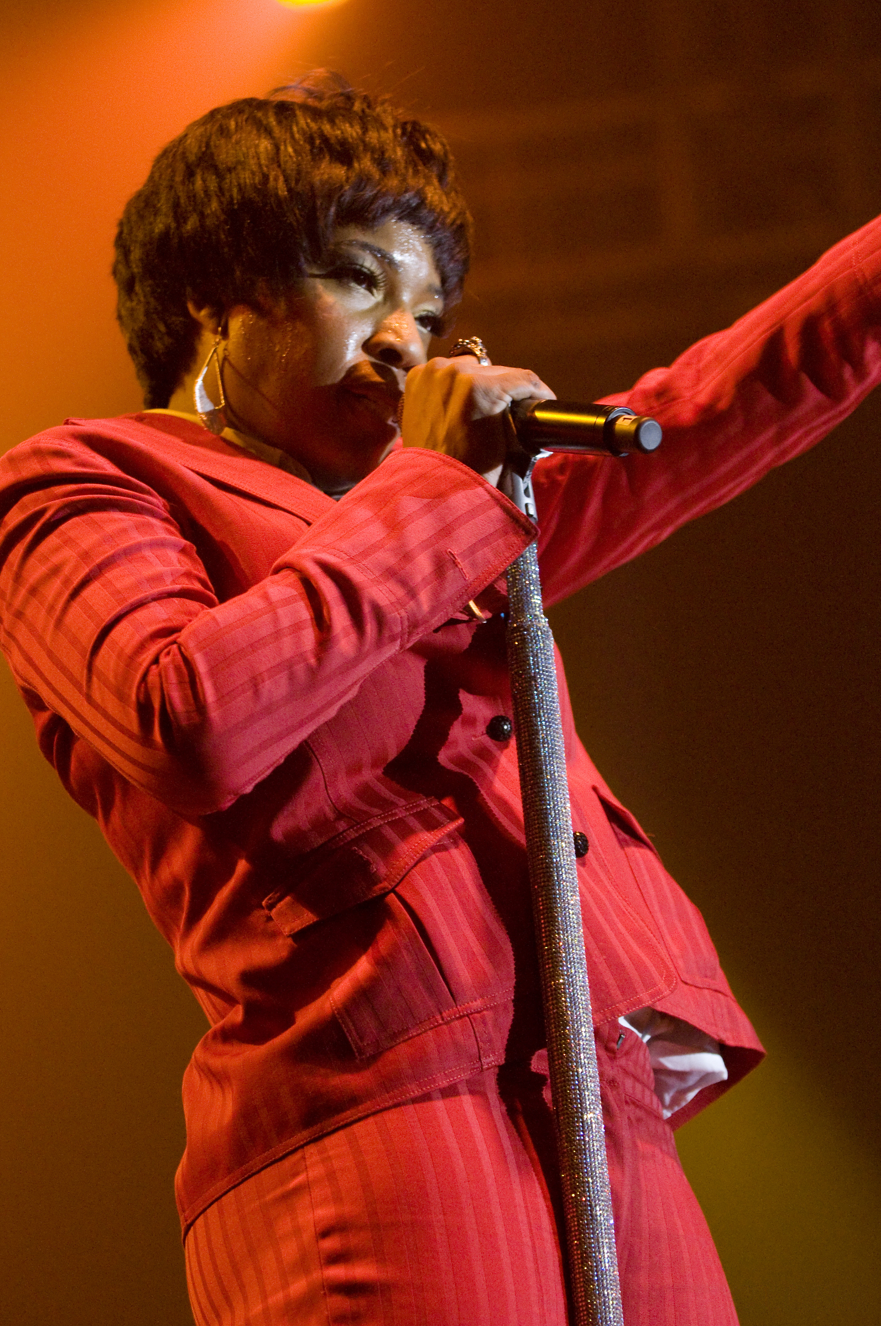 Macy Gray